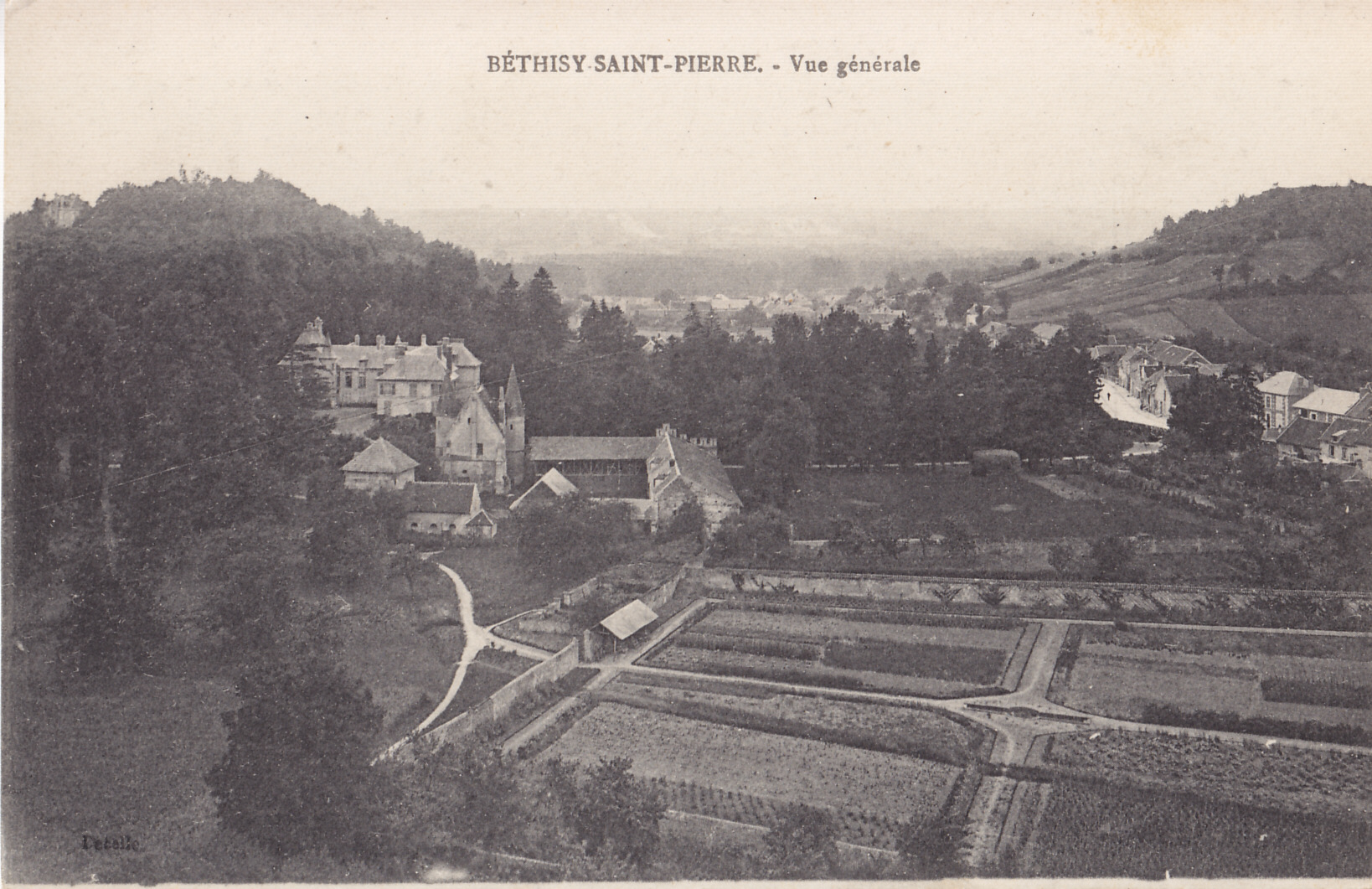 Carte postale ancienne éditée par Decelle